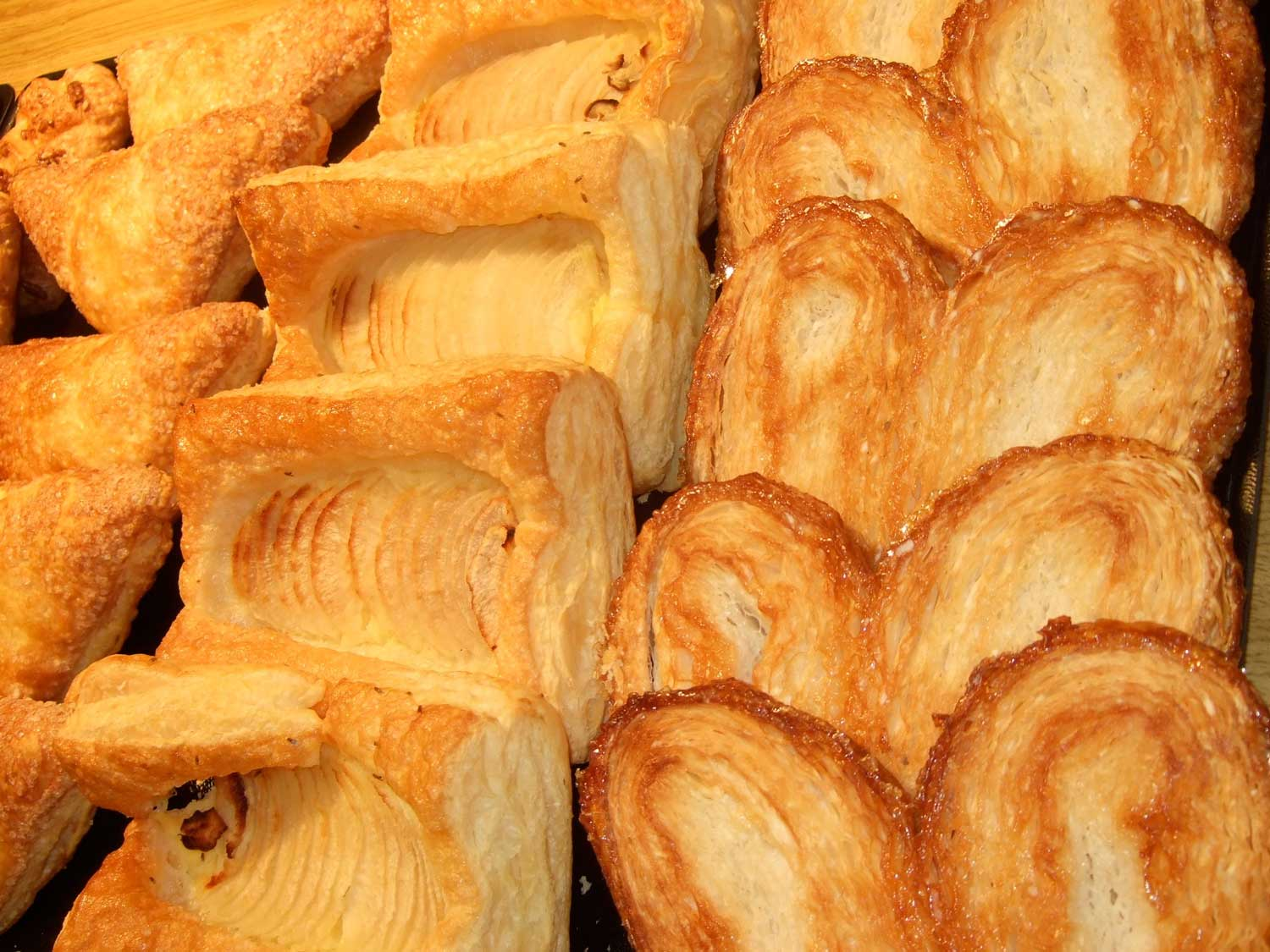 Blätterteiggebäck, Filo pastry